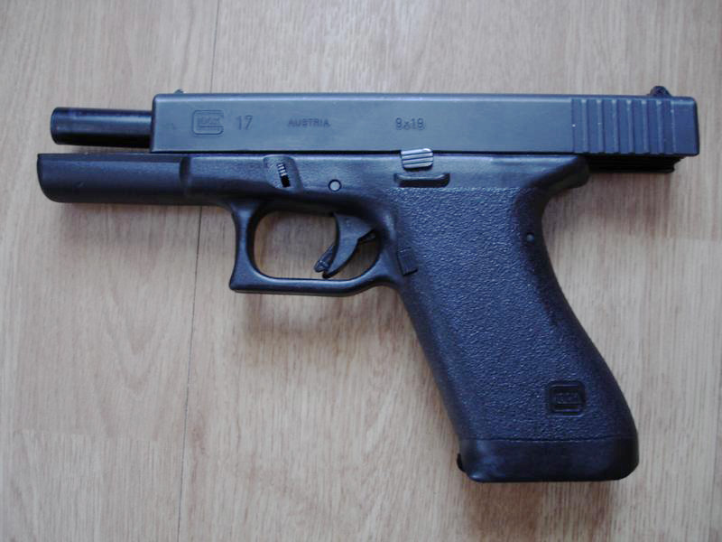 Glock 17 9mmPara (erste Ausführung - Februar 1986)